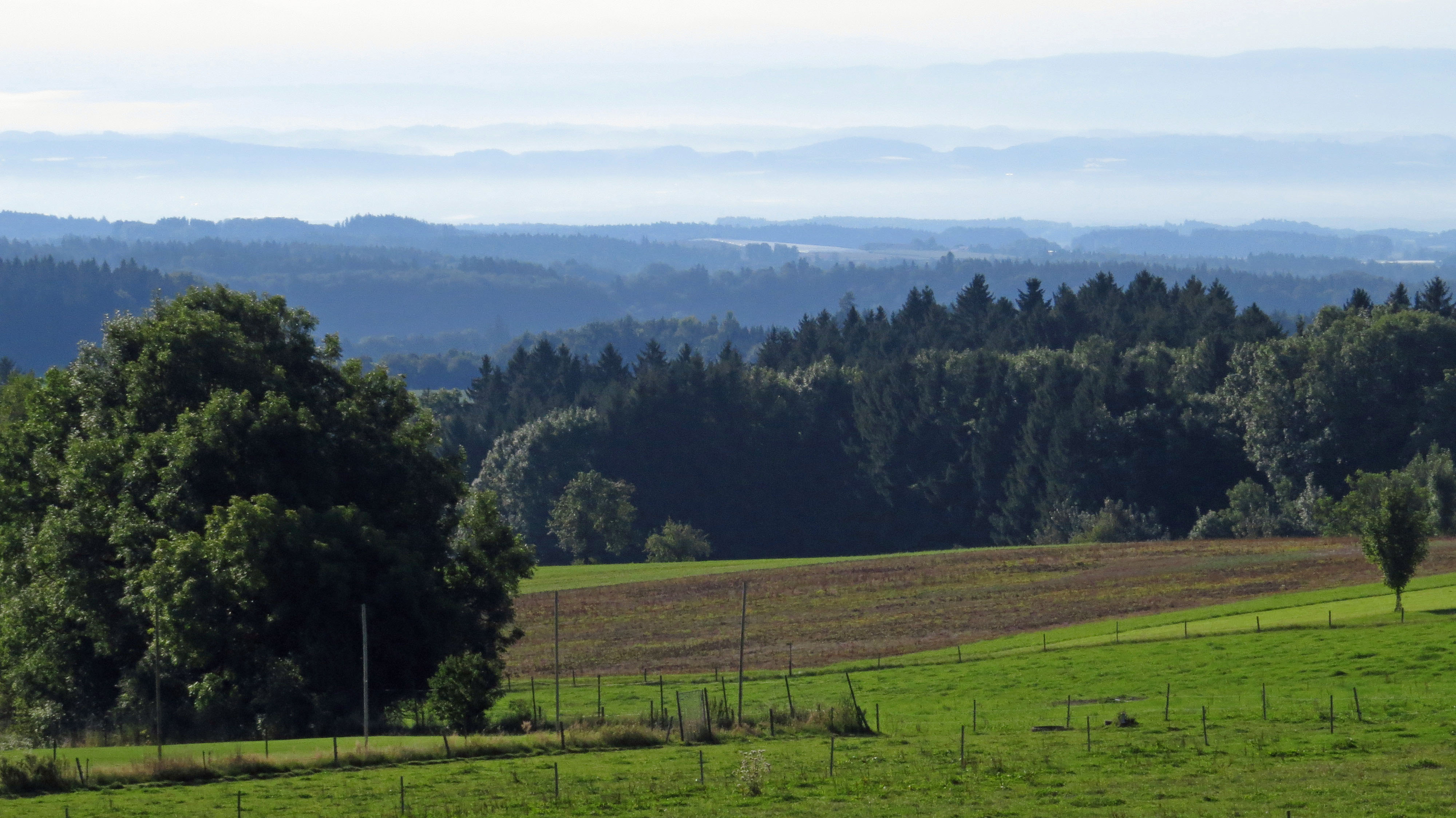 Blick von Oberhomberg zum Bodensee, Deggenhausertal